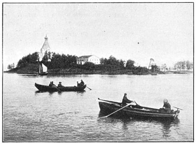 "De eilanden bij Walamo"